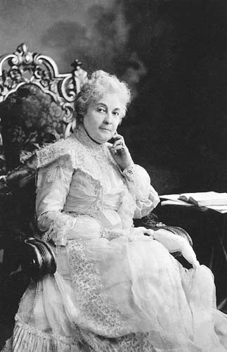 Prielle Kornélia (1826–1926) a Nemzeti Színház előadásán (Csiki Gergely: A Nagymama) 1891-ben. Strelisky felvétele